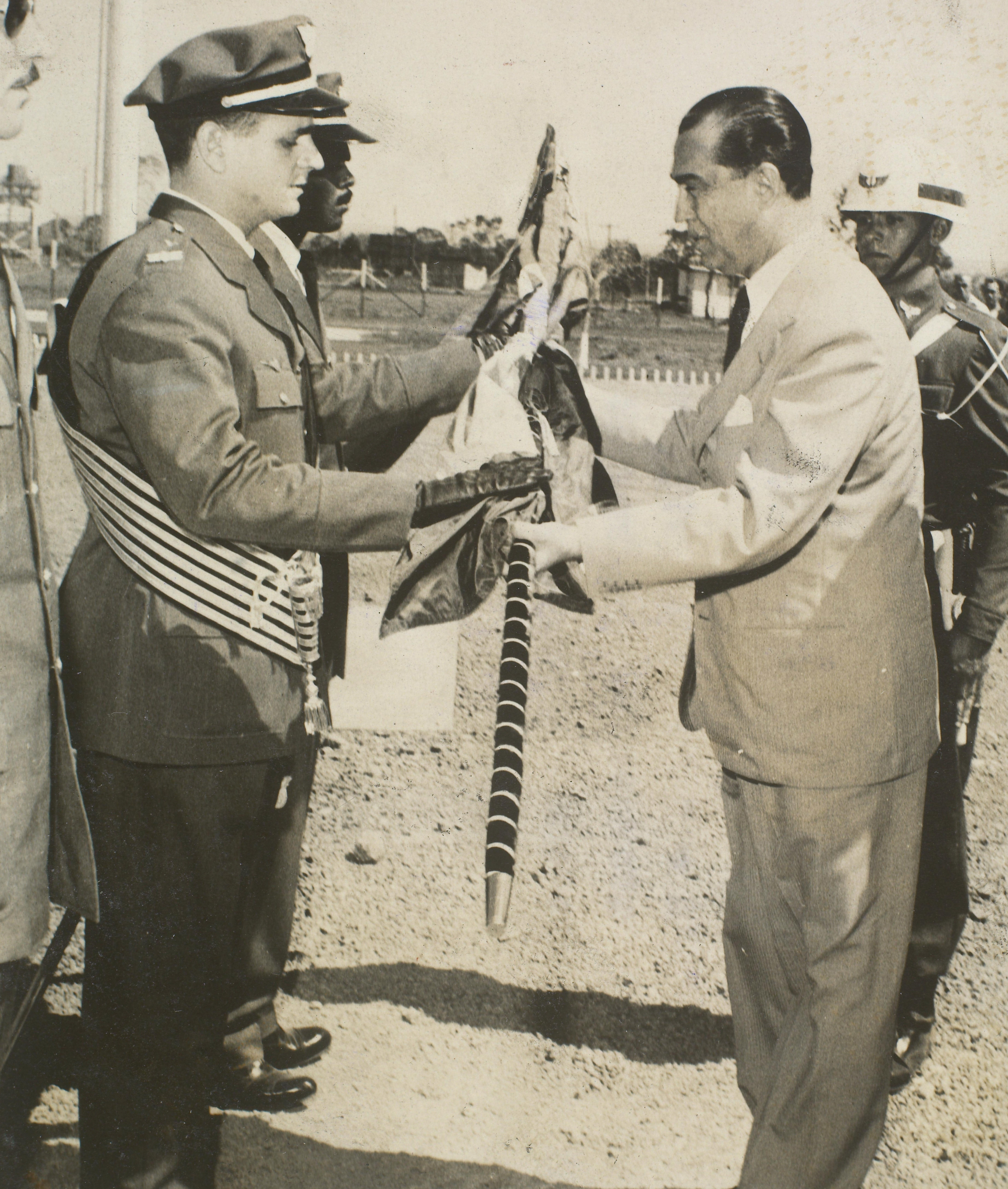 Fotografia do Fundo Correio da Manhã, sob a guarda do Arquivo Nacional.